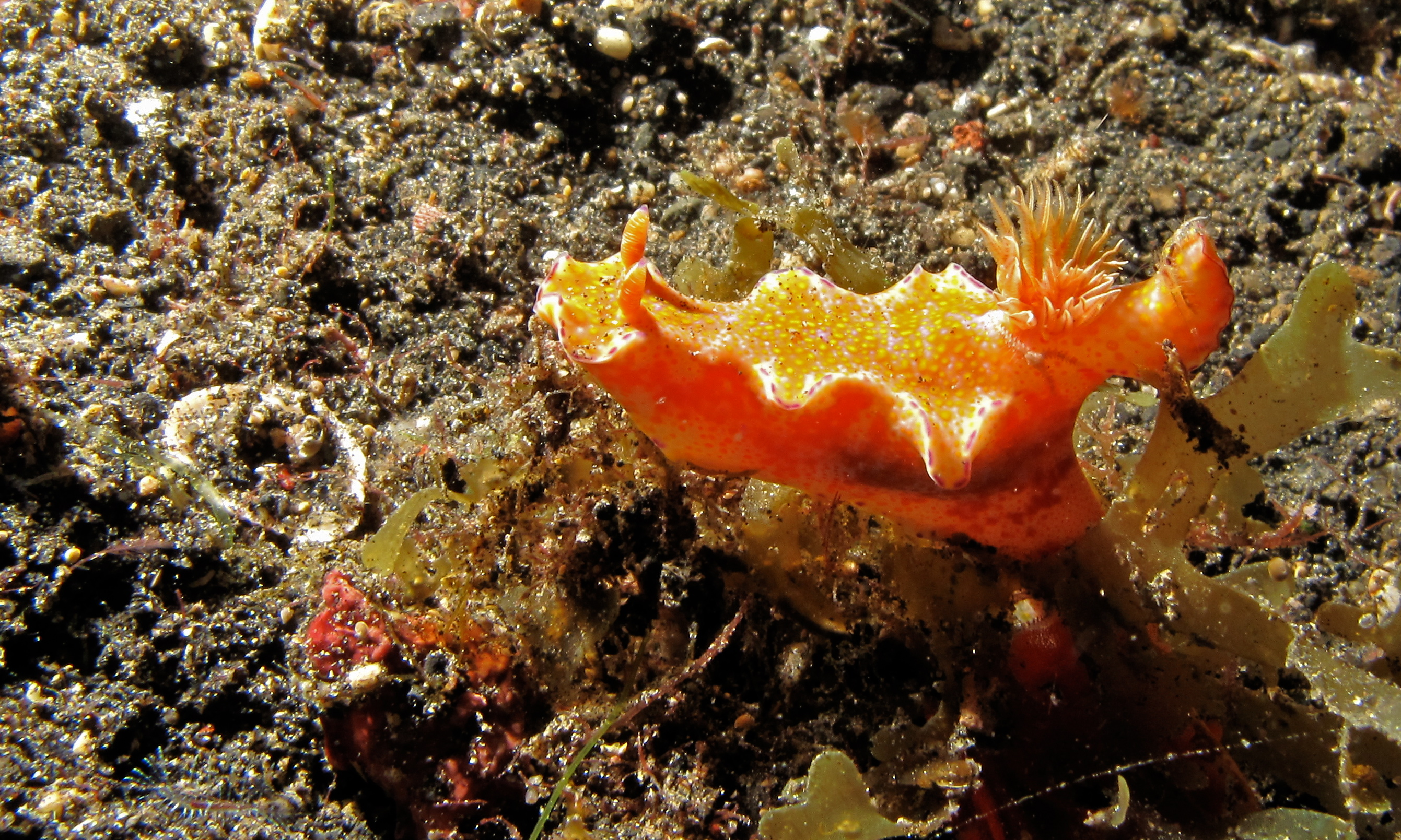 Makawide, Lembeh Strait, Sulawesi, INDONESIA